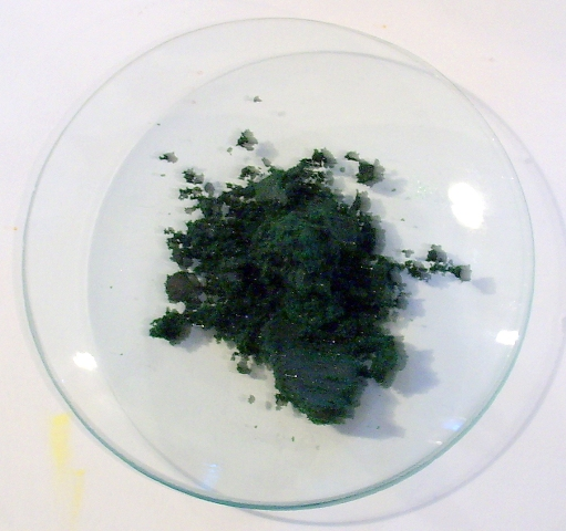 CrCl3